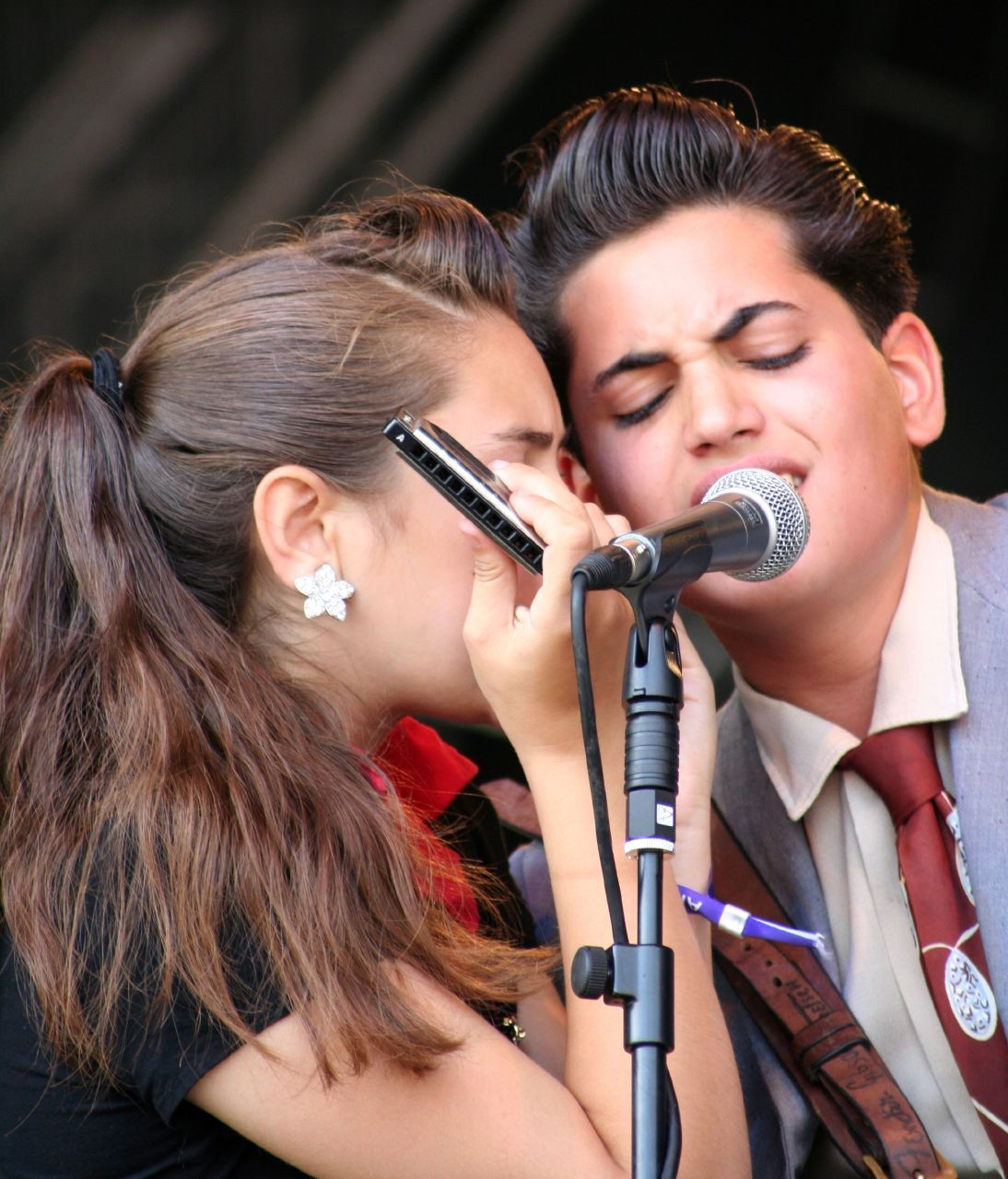 Foto tomada por Chris Barber el 11 de Agosto de 2007 en el Summer Sundae. Aparece el grupo de música Kitty,Daisy & Lewis.